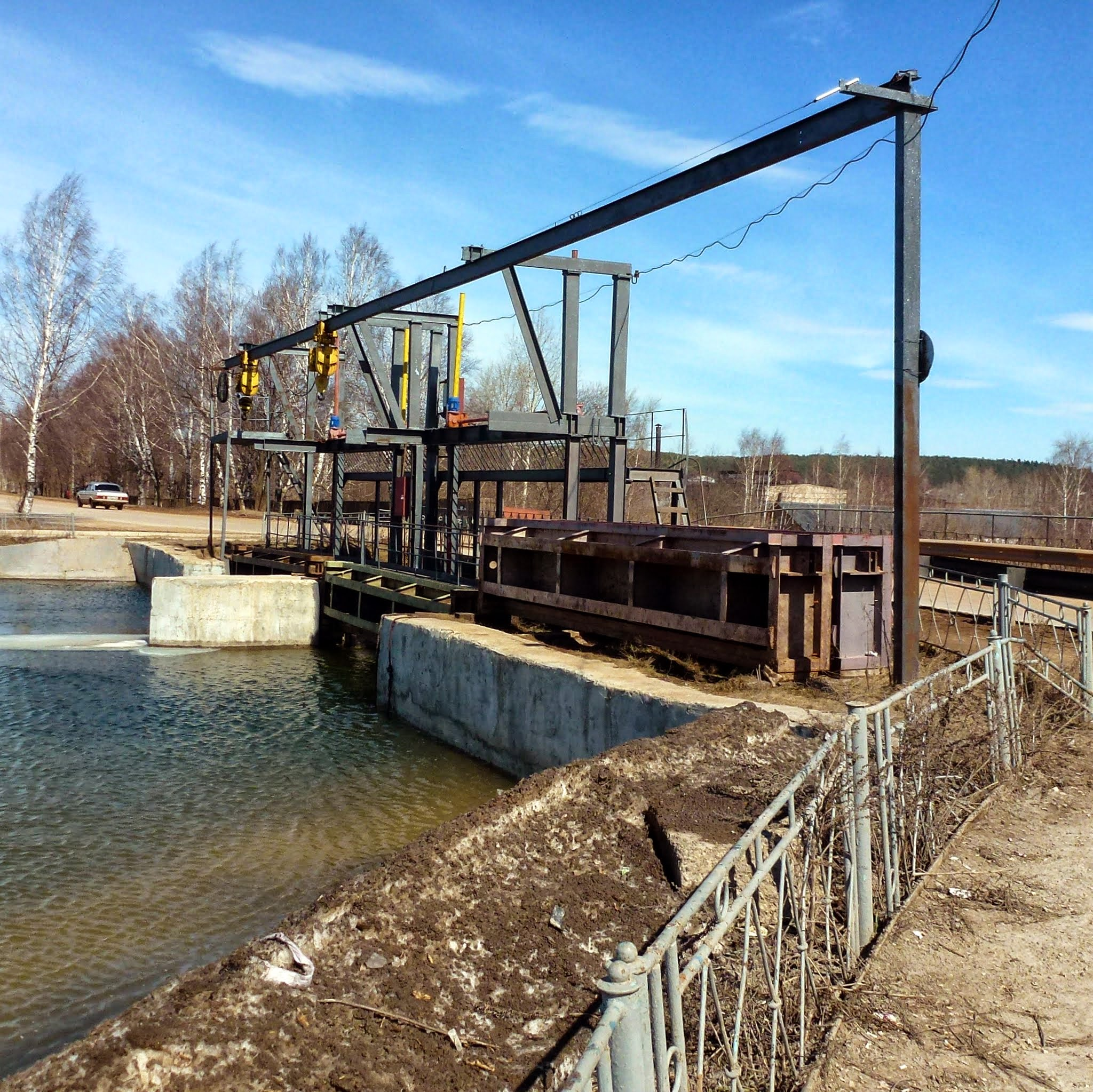 Плотина. Очер, Пермский край